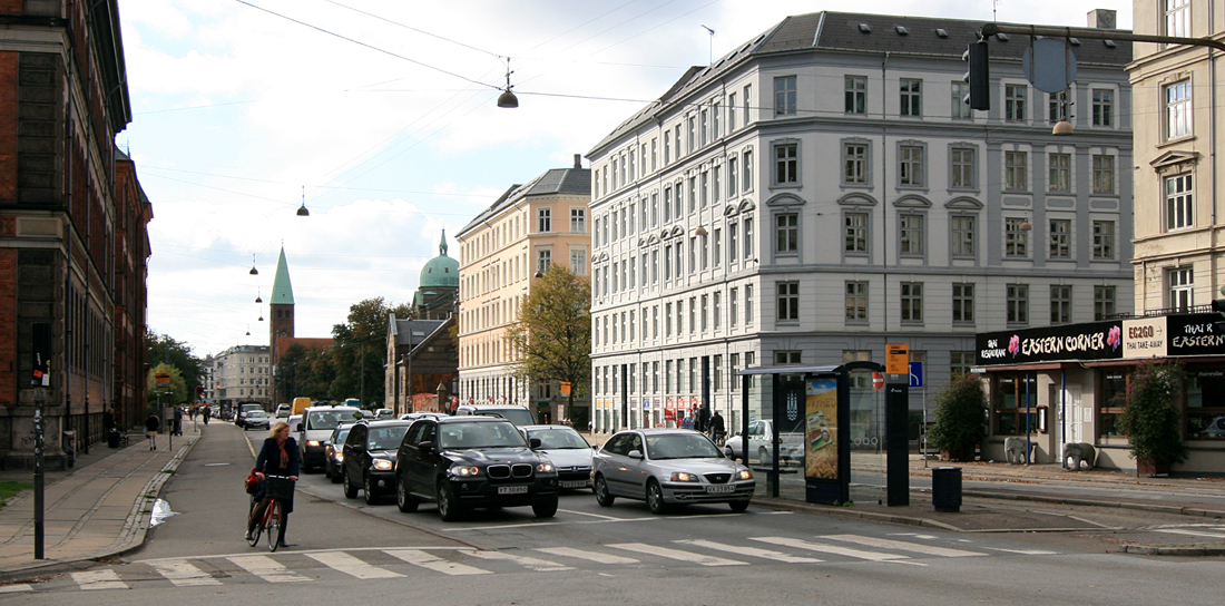 Øster Farimagsgade, København, set fra Sølvtorvet mod Sct. Andreas Kirke.